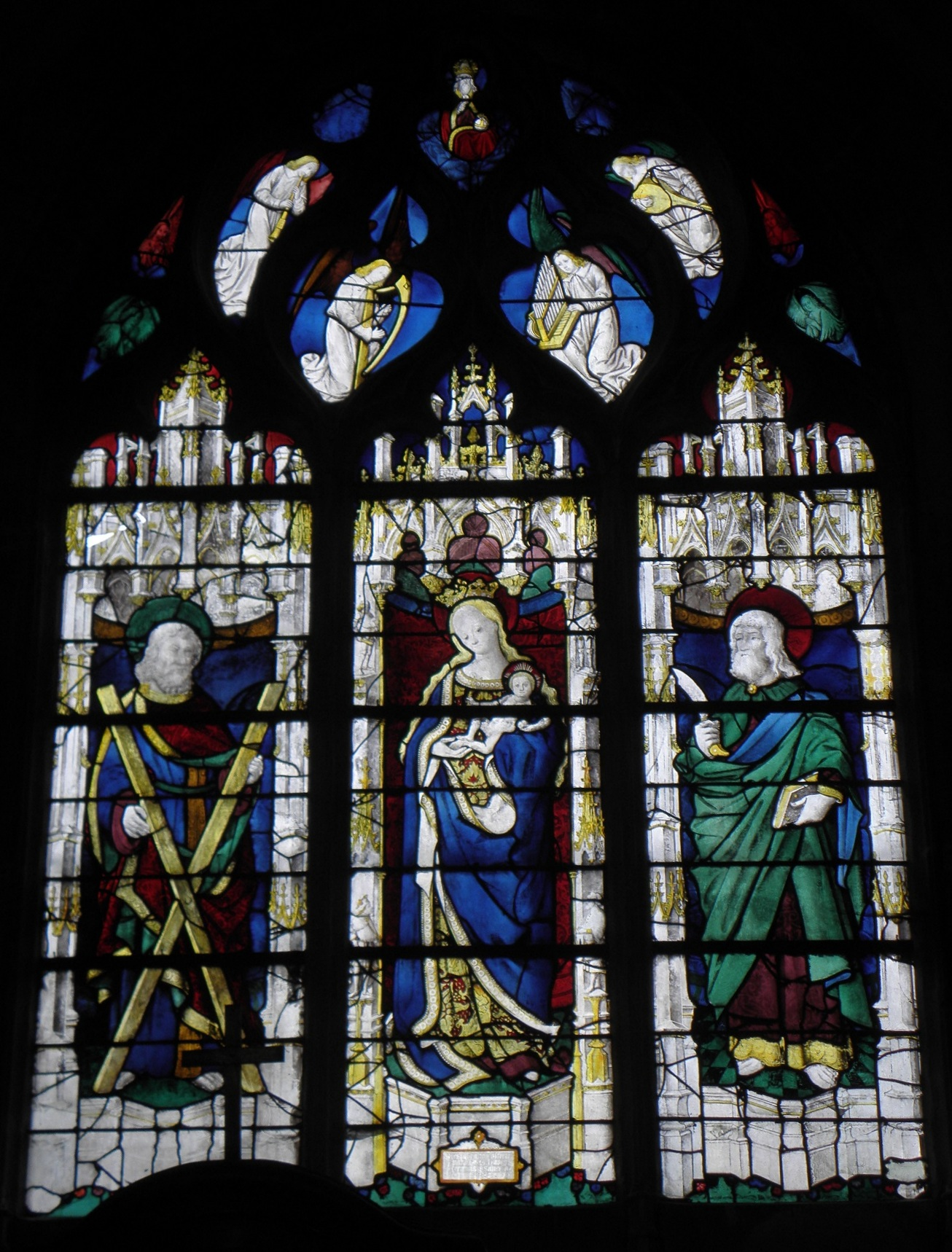 Baie 13 de l'église Notre-Dame de Louviers (27). Saint-André, Vierge à l'Enfant, Saint-Barthélémy.